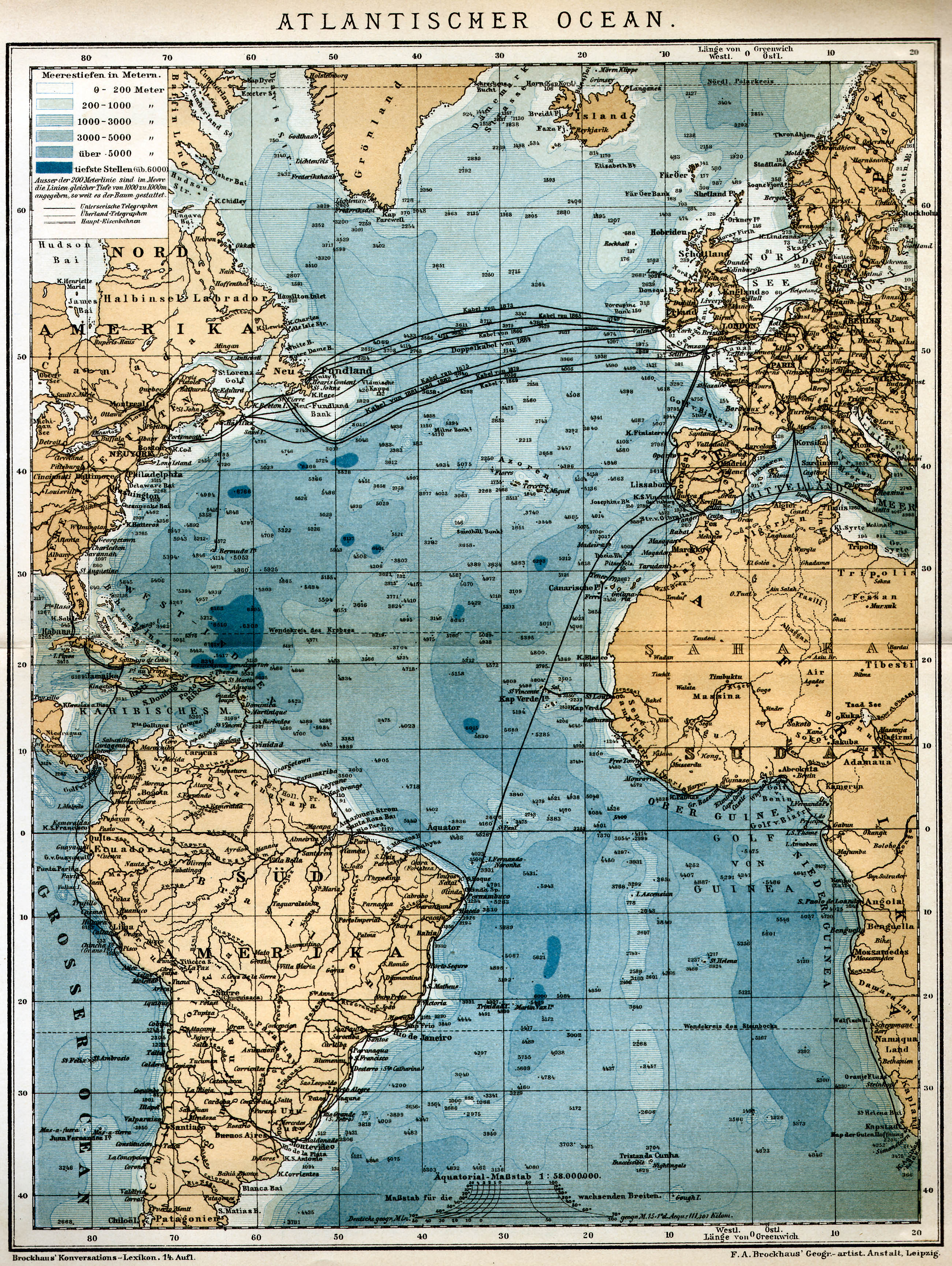 Karte Atlantischer Ozean mit Telegrafenletungen aus Brockhaus' Konversationslexikon 14. Auflage